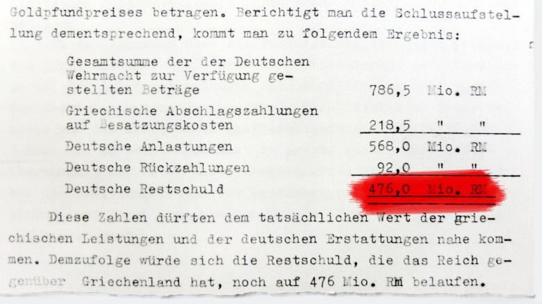 Auszug aus der Akte R 27320, Blatt 114 (Signatur R 27320) im Politischen Archiv des Auswärtigen Amtes